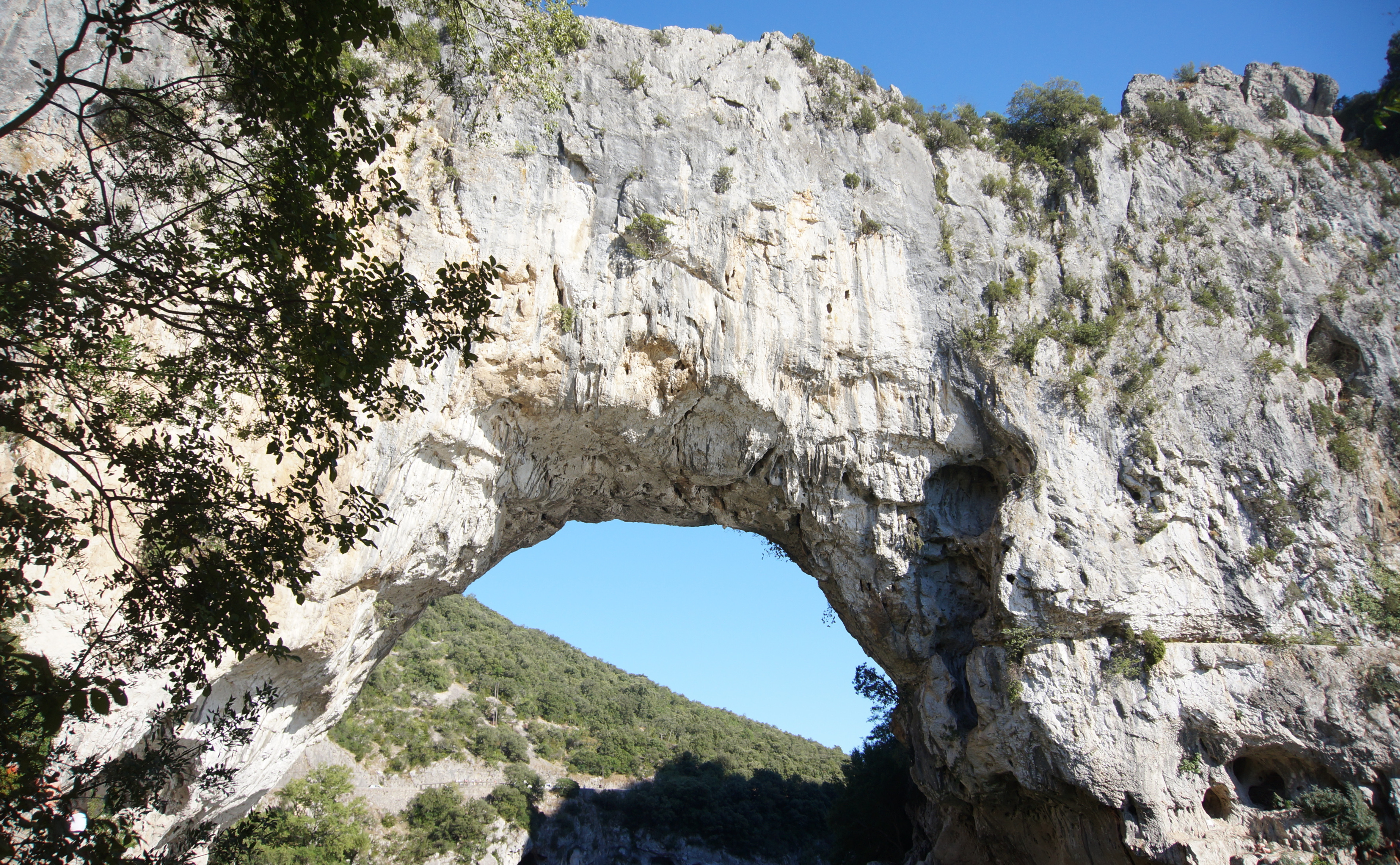 Le Pont d'Arc en Ardèche, début des gorges de l'Ardèche